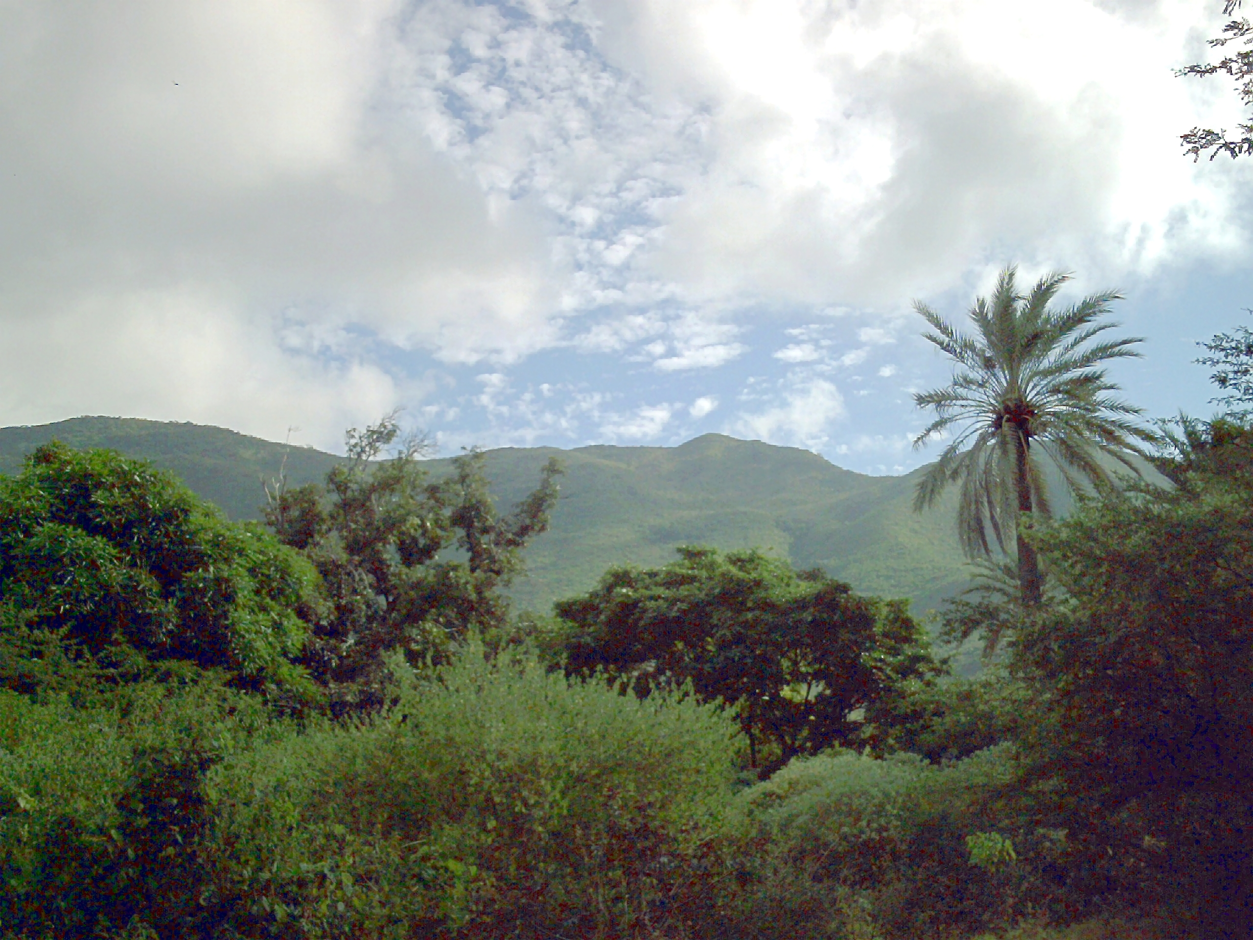 Vista de huerto en las cercanías del cerro copey, Nueva Esparta, Venezuela